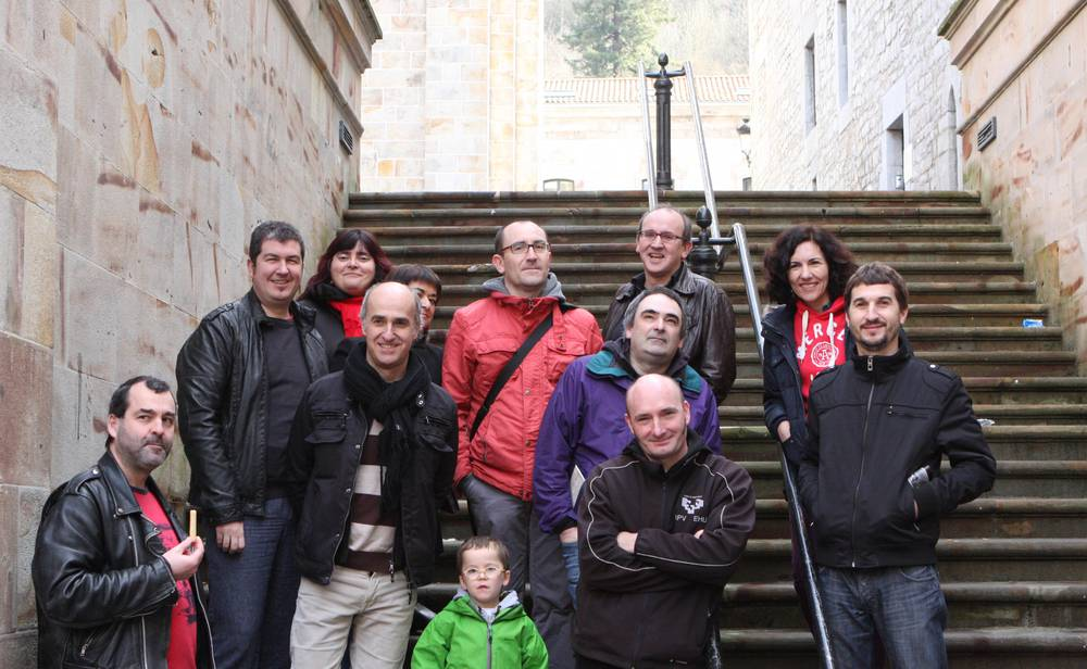 elkarteko kideak 2013an Bergaran